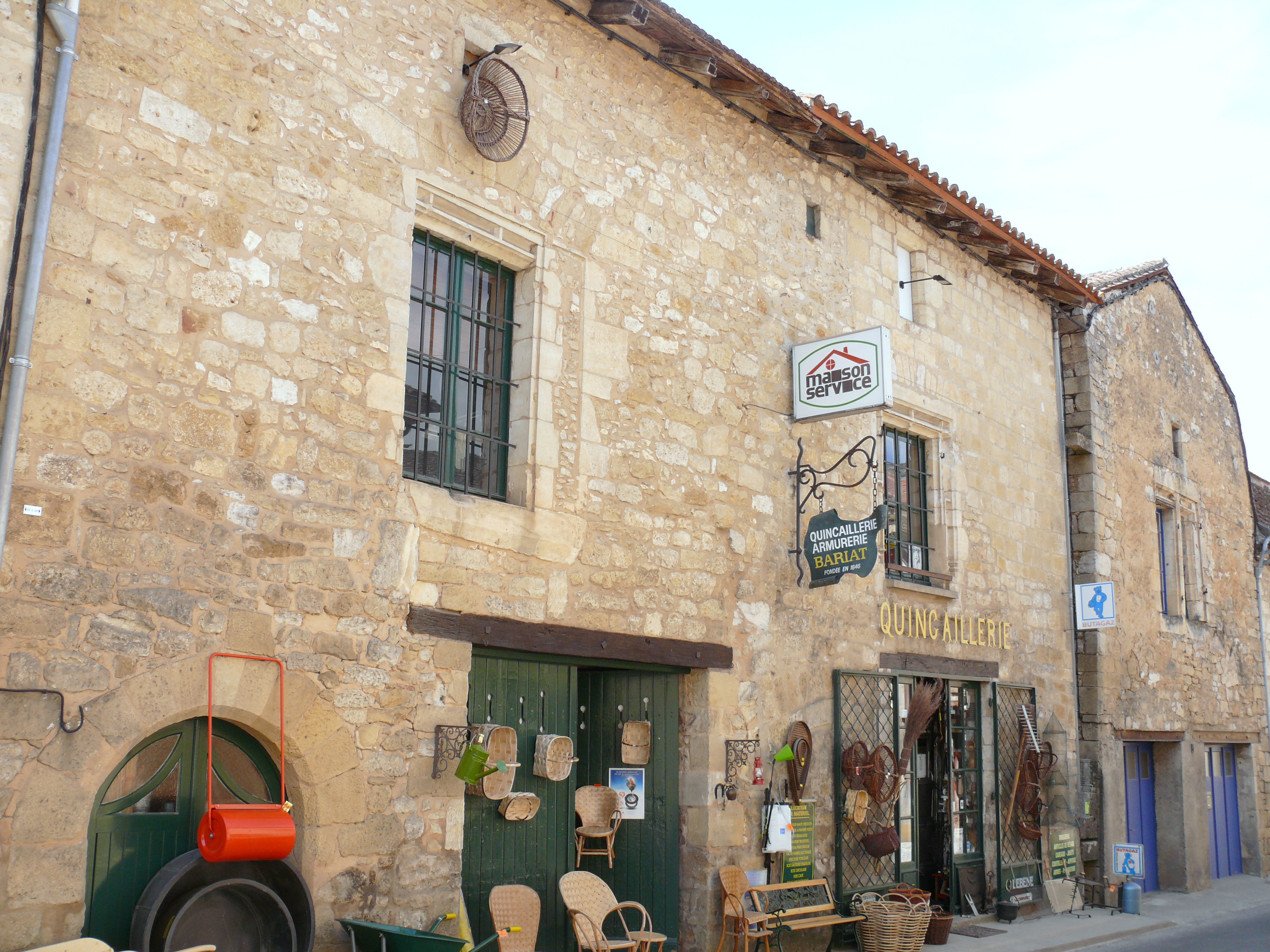 Beaumont-du-Périgord - Quincaillerie Bariat, 33 rue Foussal